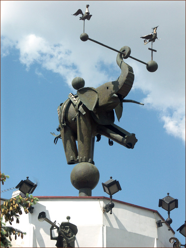 Главный зверик театра